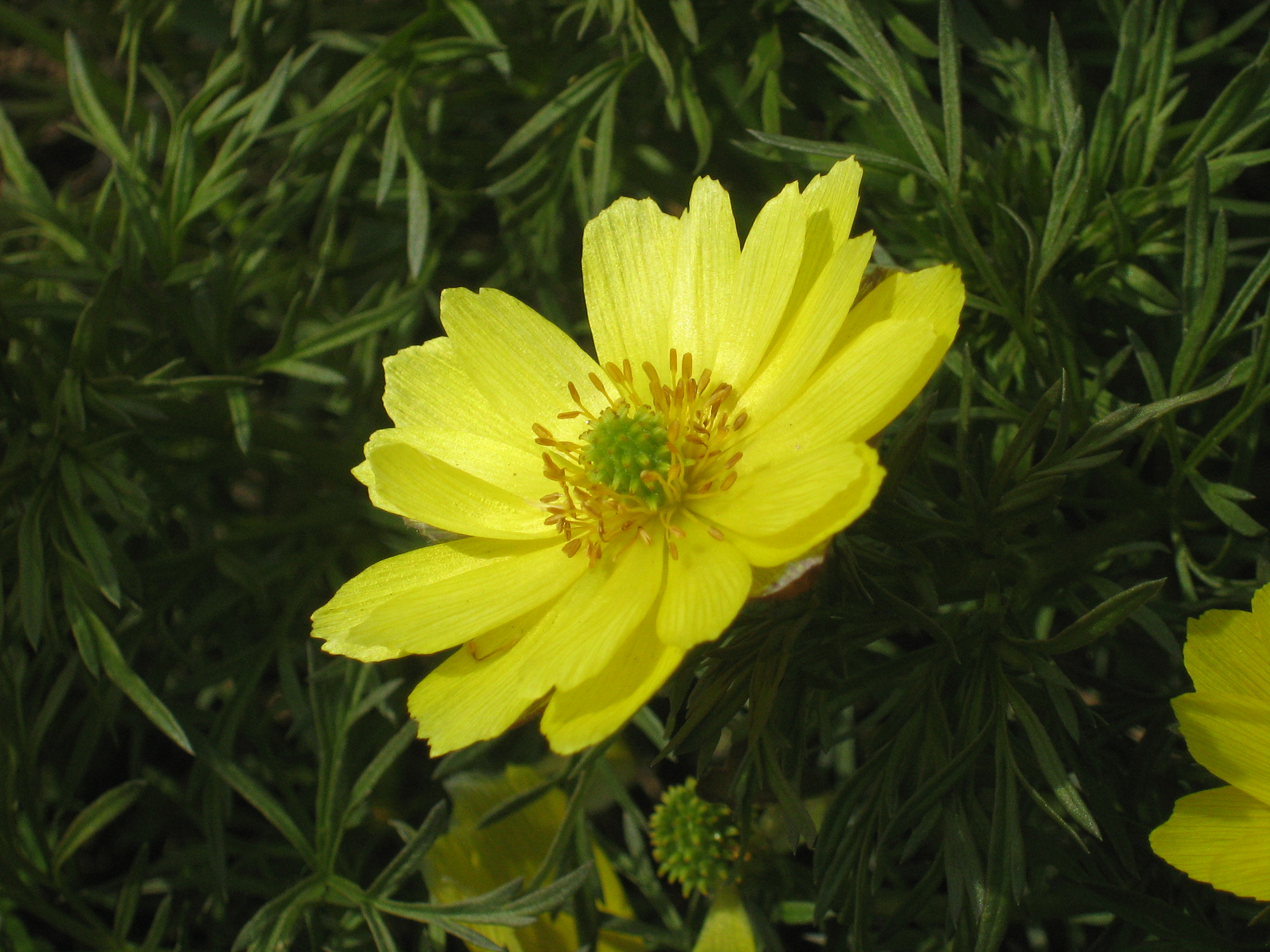 Адонис волжский (Adonis wolgensis Steven)